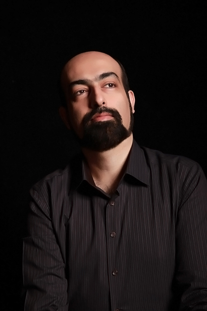 محمدمهدی گورنگی (آهنگساز و مدرس موسیقی) ۱۳۸۸